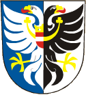 znak obce